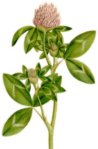 Rödklöver (Trifolium pratense)